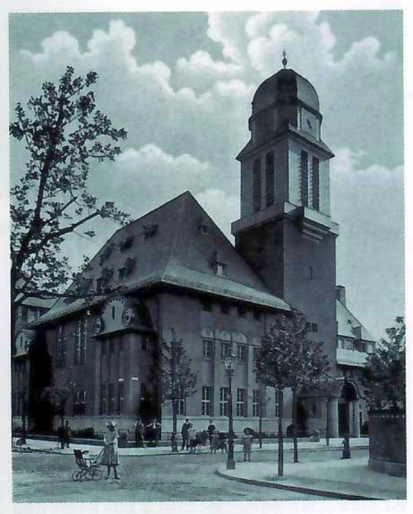 Historische Aufnahme der Friedenskirche in Offenbach am Main kurz vor dem Ersten Weltkrieg. Blick von der Körnerstraße auf das Gebäude